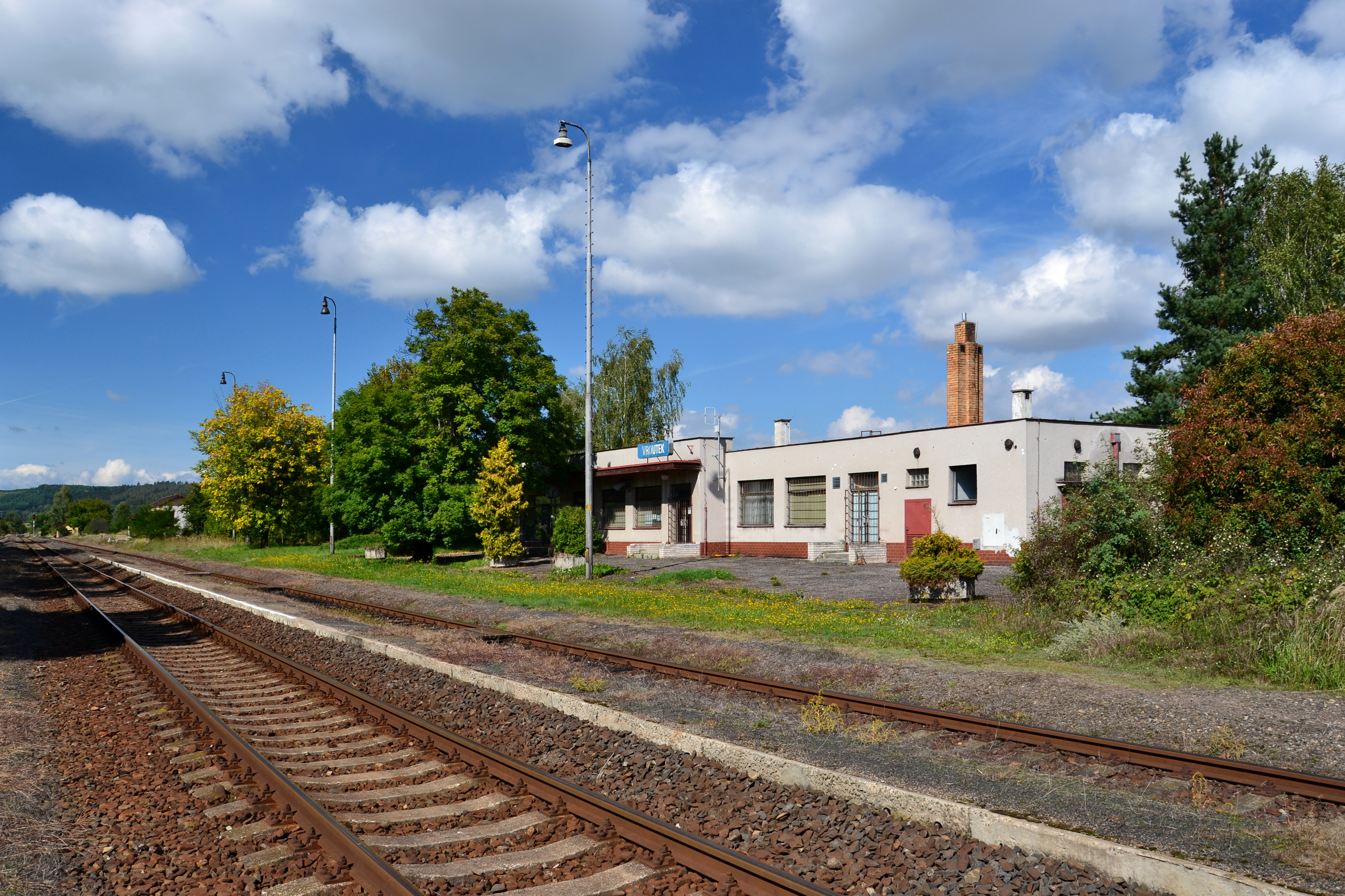 Vroutek – nádraží